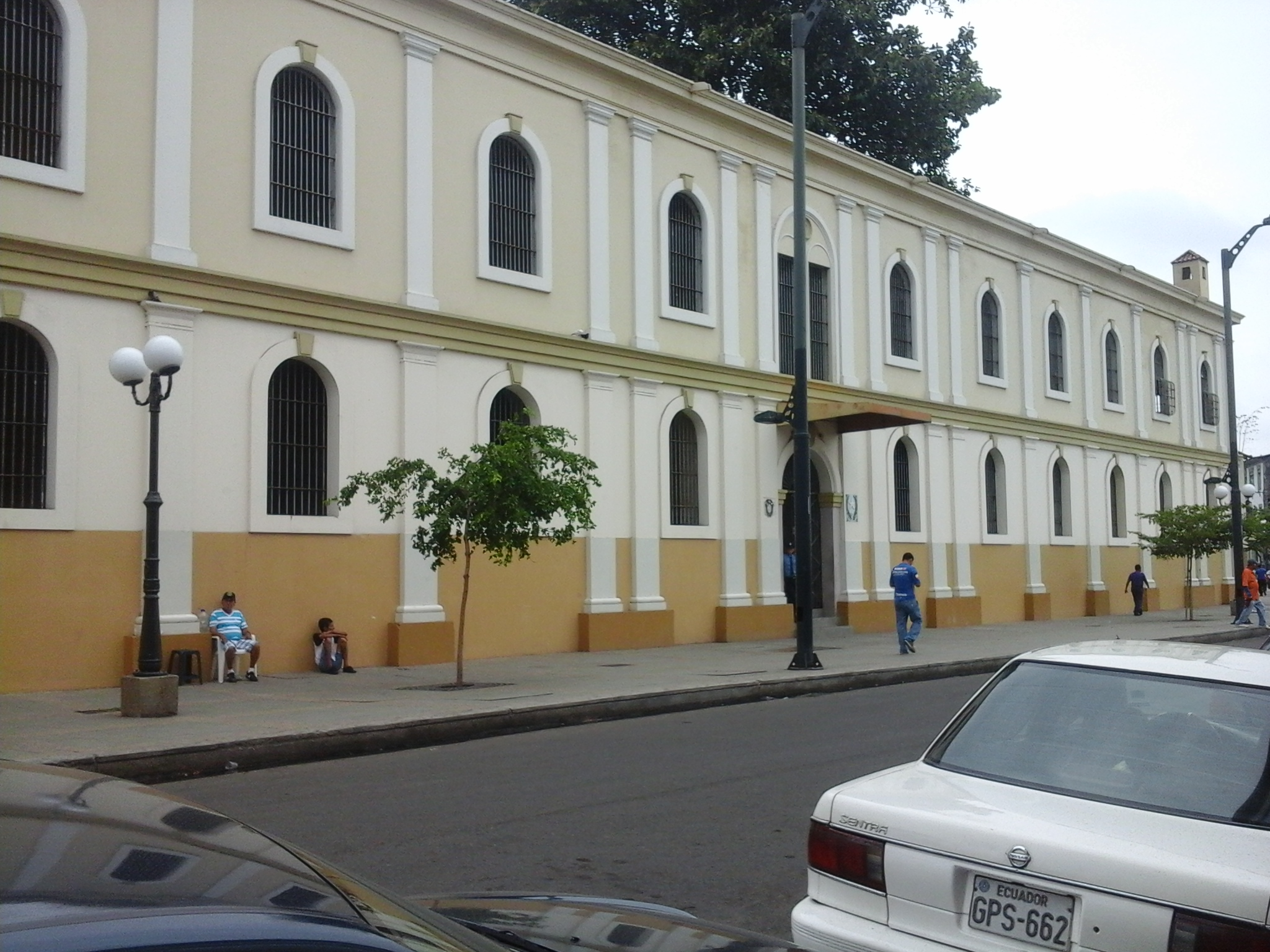 Vista de la antigua Cárcel Municipal de Guayaquil.